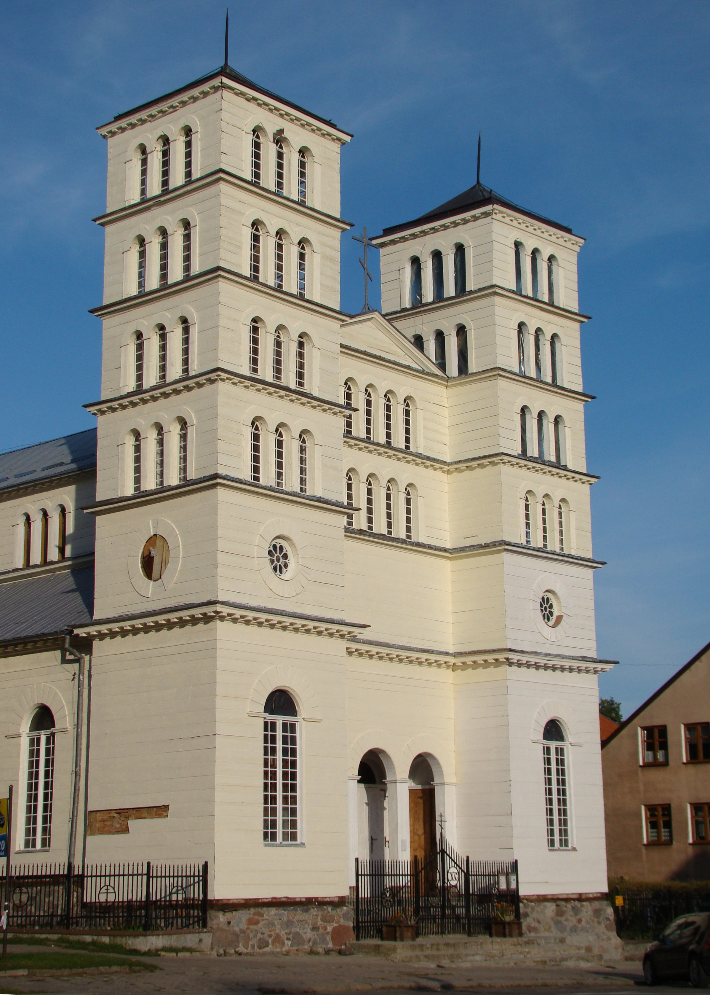 Lidzbark Warmiński - dawny kościół ewangelicki (obecnie cerkiew prawosławna)